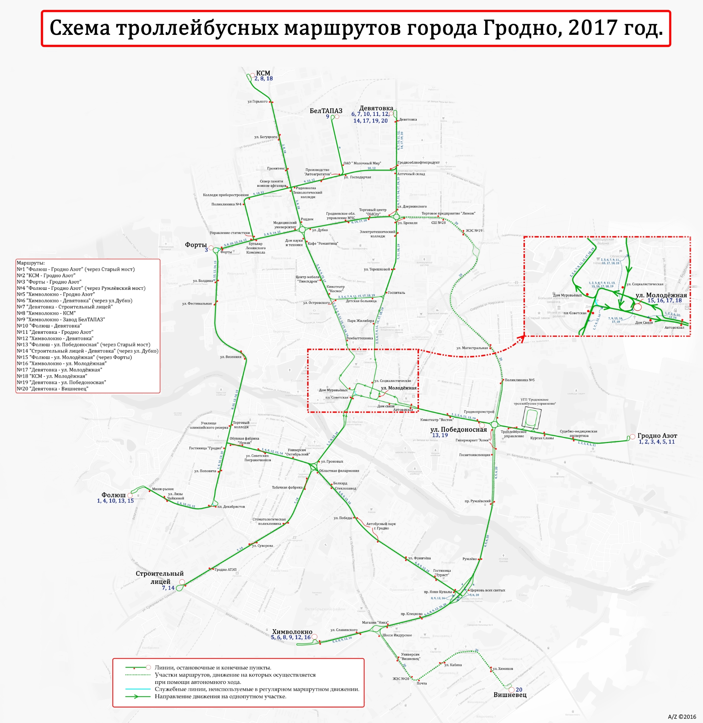 Схема троллейбусных маршрутов. Январь 2017 год.